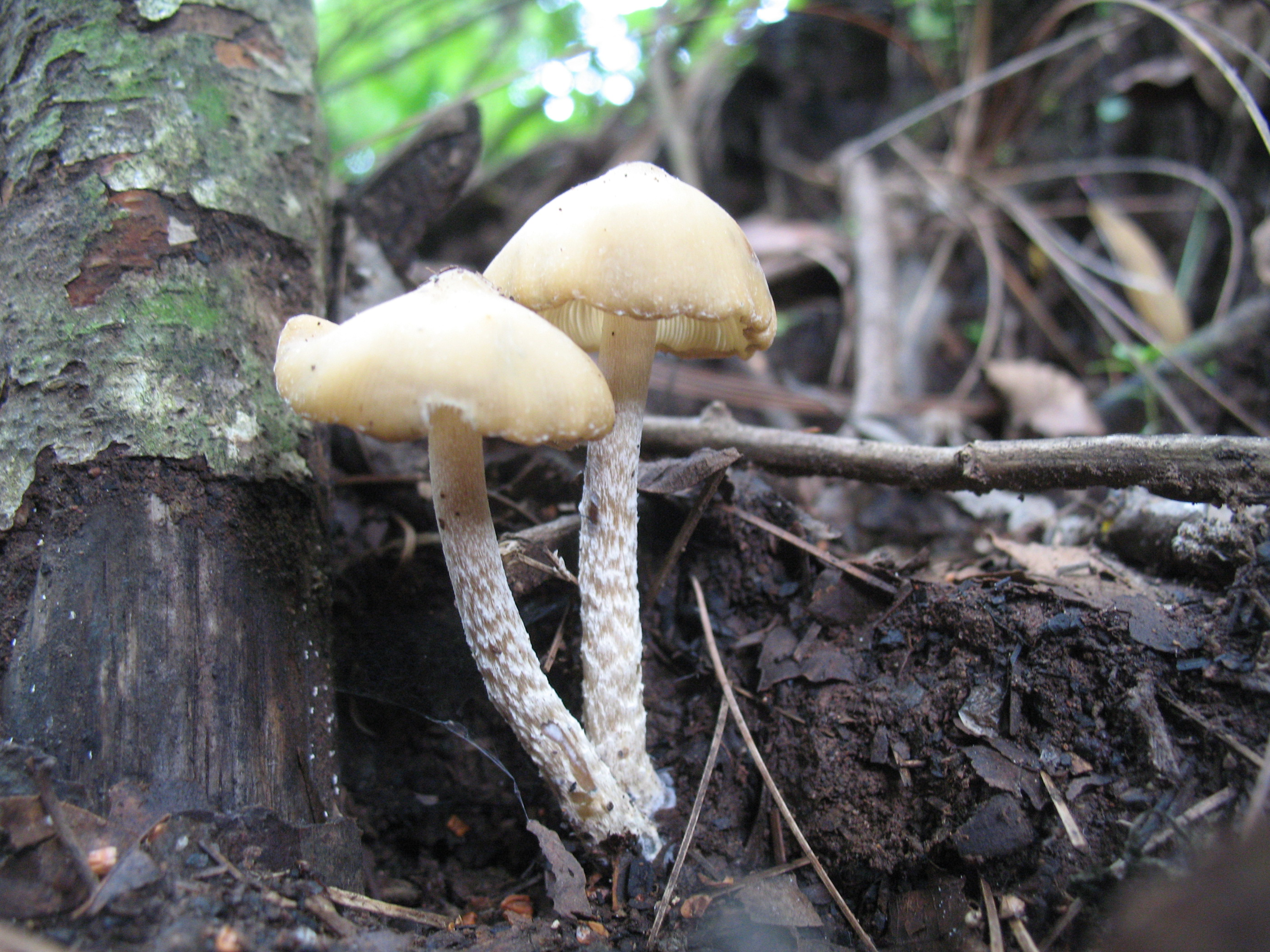 Psilocybe zapotecorum. Jalisco, Mexico.